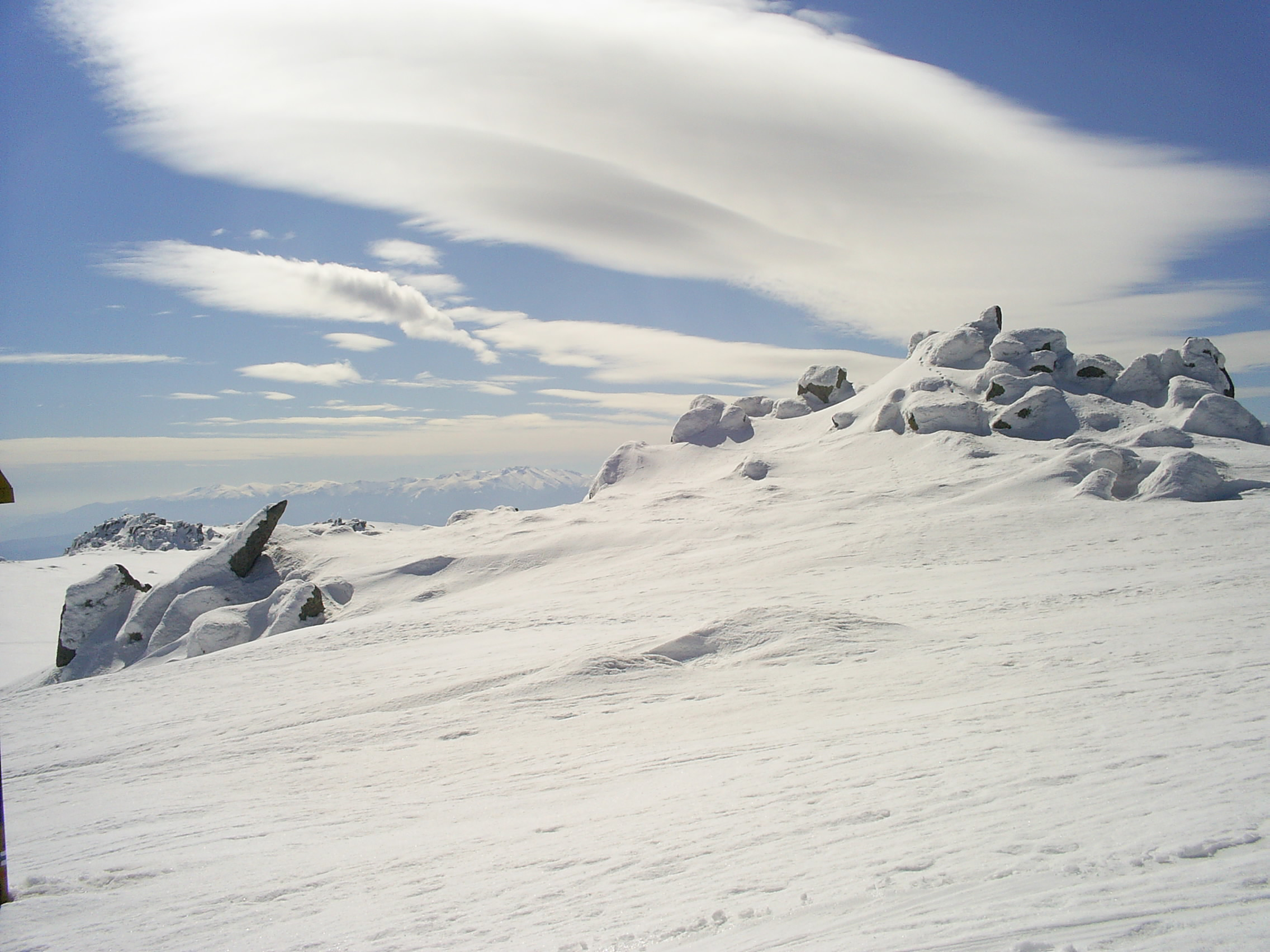 Landscape - Cherni Vruh, Vitosha, Bulgaria